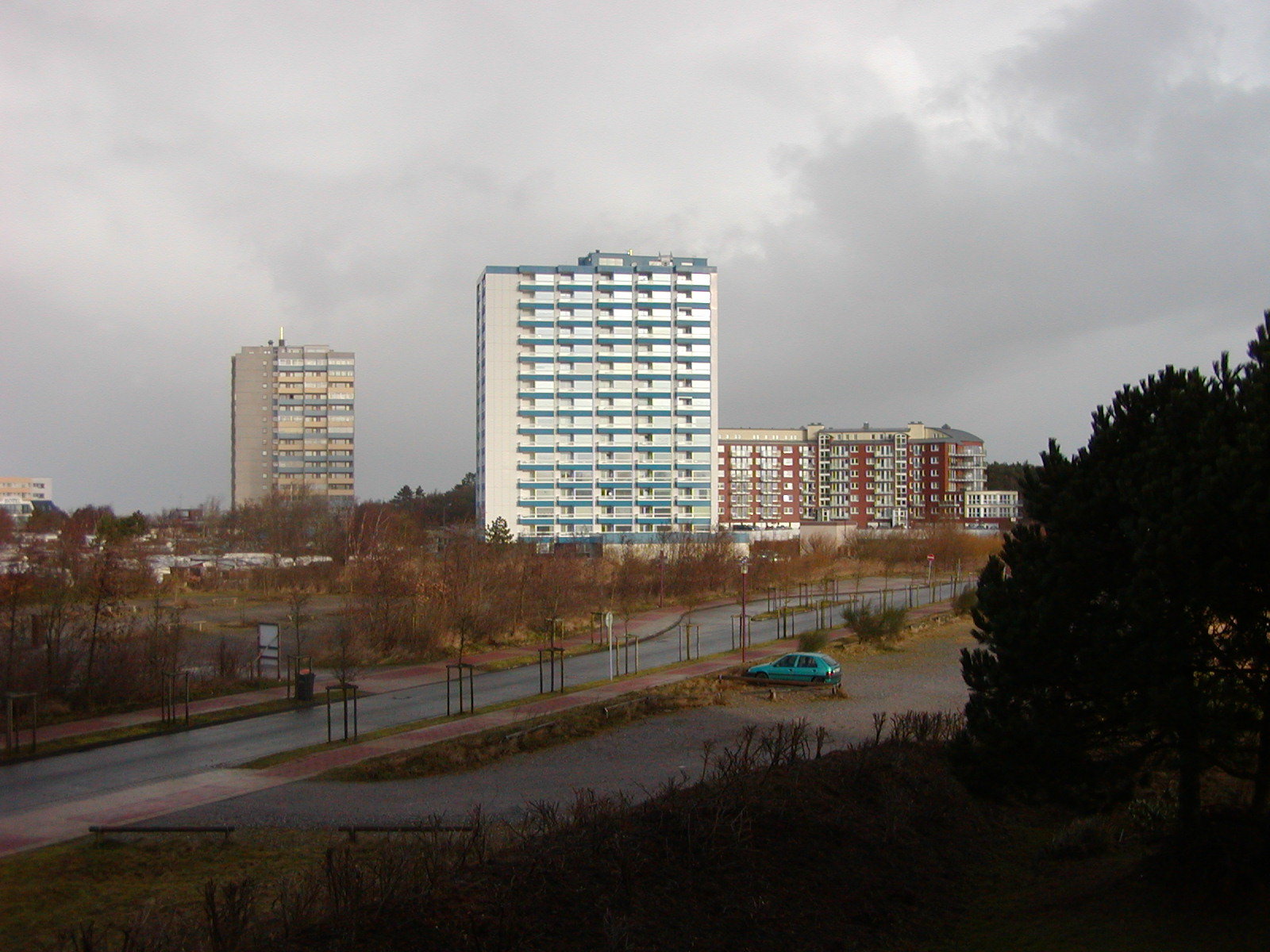 Hochhäuser in Sahlenburg (schön?)